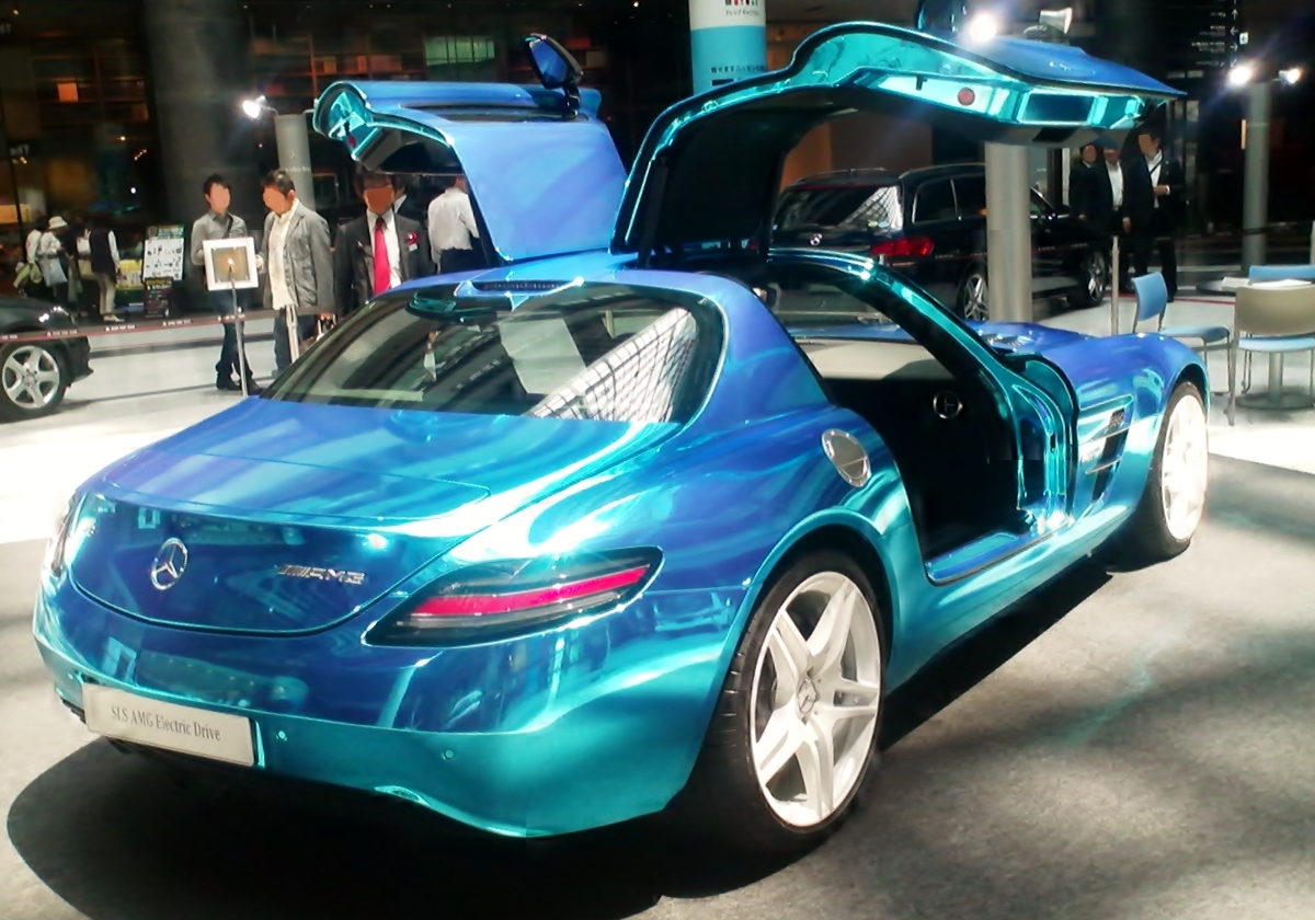 C197型メルセデス・ベンツSLS AMGエレクトリックドライブをリアから撮影。